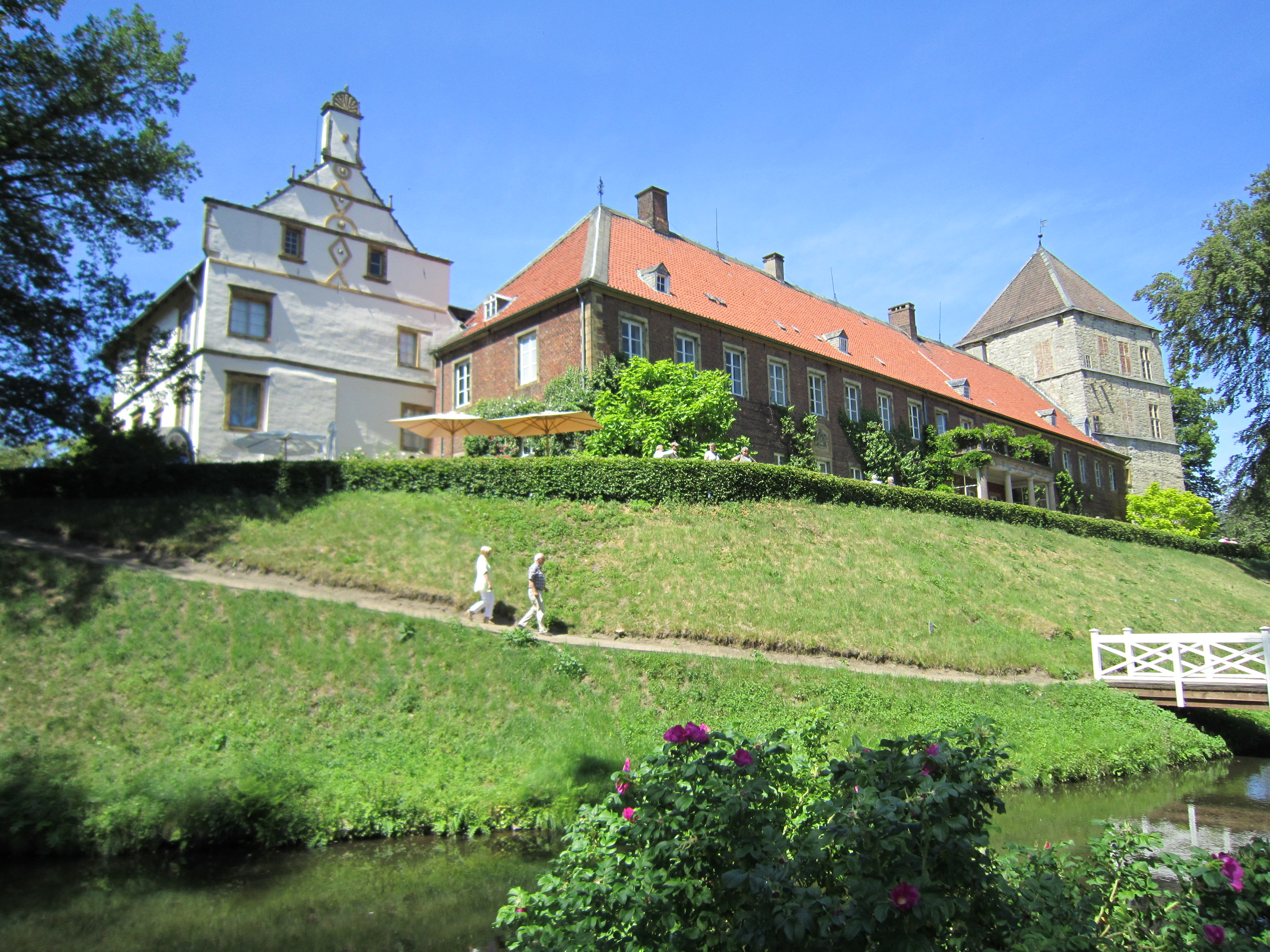 Schloss Rheda, Blick über die Gräfte